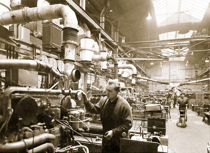 In einer großen Motoren-, Maschinen- und Waggonfabrik Die Klöckner-Humboldt-Deutz AG ist die älteste Motorenfabrik der Welt. Sie wurde von Nikolaus August Otto, dem Erfinder des Viertaktmotors (Otto-Motor, 1876) im Jahre 1864 gegründet. Der berühmte Motorenkonstrukteur Gottlieb Daimler wirkte hier als technischer Leiter. Das Stammwerk der Firma befindet sich in Köln-Deutz. Das Unternehmen ist heute mit über 25 000 Beschäftigten, einem Export in 125 Länder der Welt und einem Jahresumsatz von rund 800 Millionen DM eines der größten Unternehmen des Maschinenbaus. Das Produktionsprogramm des Stammwerkes und der angeschlossenen Unternehmen umfaßt u.a. Dieselmotoren (incl. Großmotoren), Schlepper, Nutz- und Schienenfahrzeuge, Lokomotiven, Aufbereitungsanlagen, Behälter, Spezialmaschinen, Stahlkonstruktionen und Zementfabriken. Von den Markenzeichen der Klöckner-Erzeugnisse sind u.a. Deutz, Magirus, Humboldt und Westwaggon weltbekannt. Im Bild: An den Prüfständen im Mittelmotorenbau